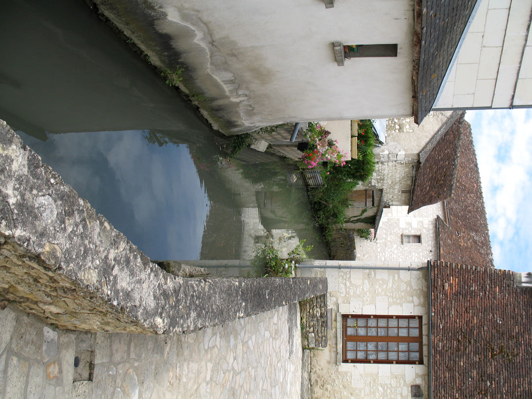 Petite rivière dans Ligueil, Indre-et-Loire, France